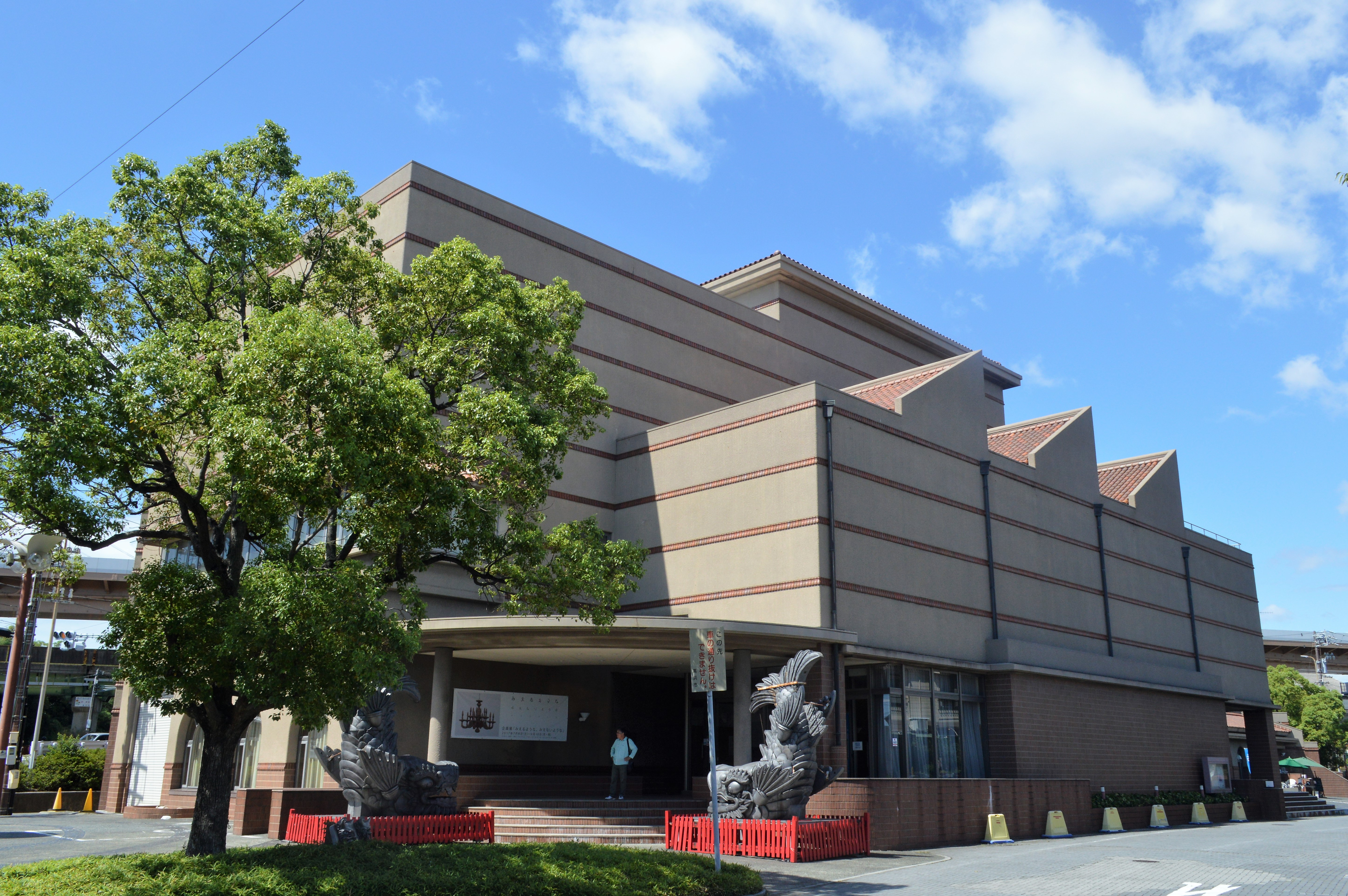 愛知県高浜市にある高浜市やきものの里かわら美術館。